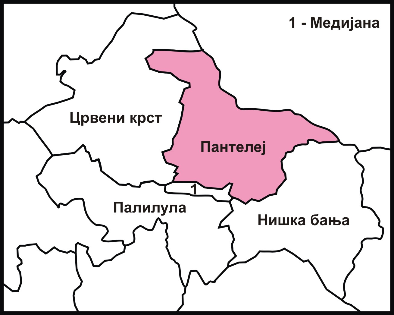 Gradska opština Pantelej.